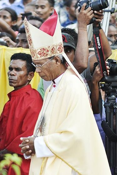 Tetun: Norberto do Amaral